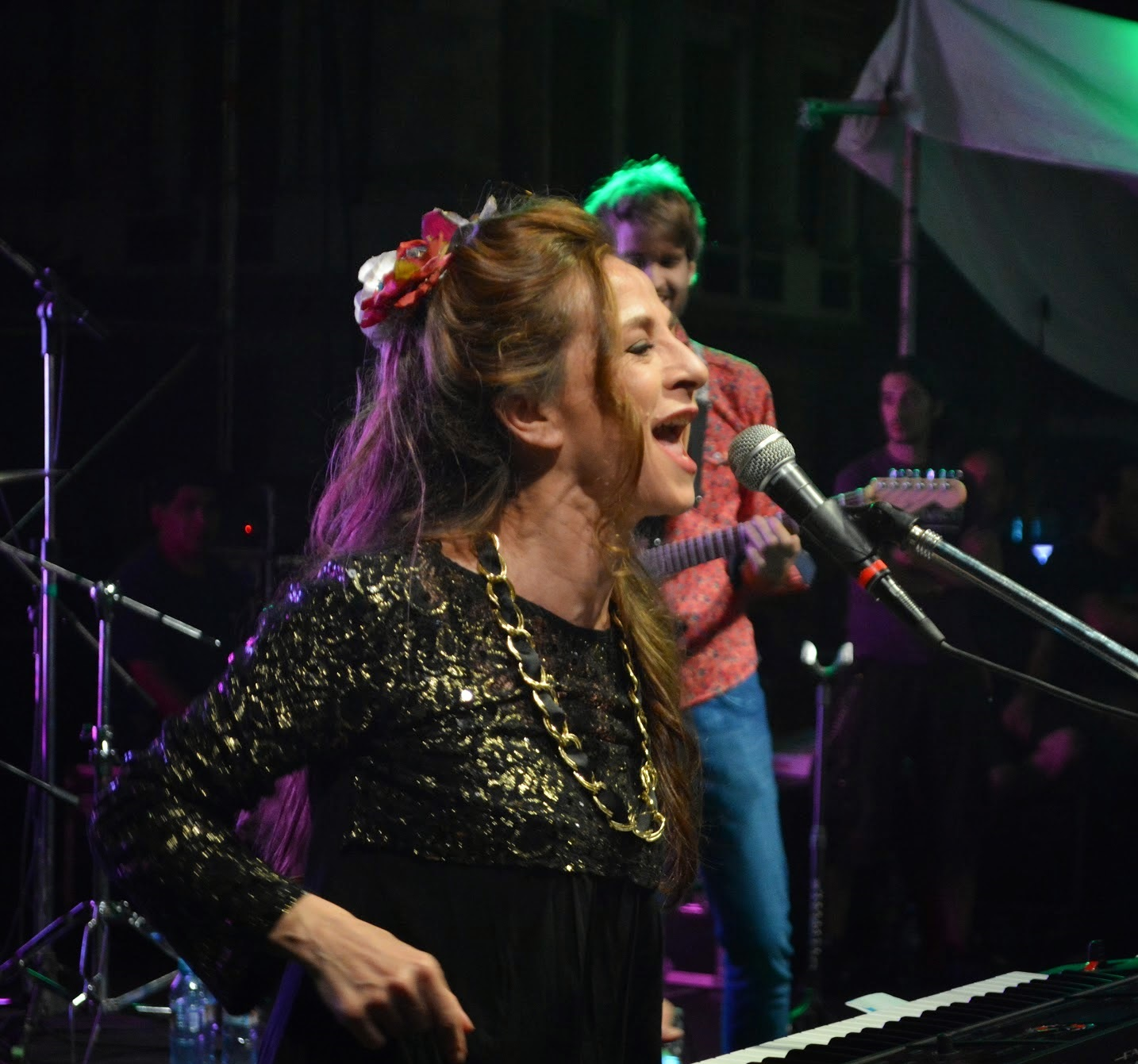 Buenos Aires, 15 de noviembre de 2014. Se llevó a cabo el tradicional festejo, donde sonaron solistas y bandas programados por el Ministerio de Cultura de la Nación.